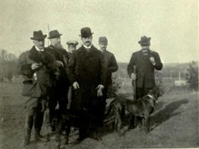 Alejandro I de Serbia de cacería.